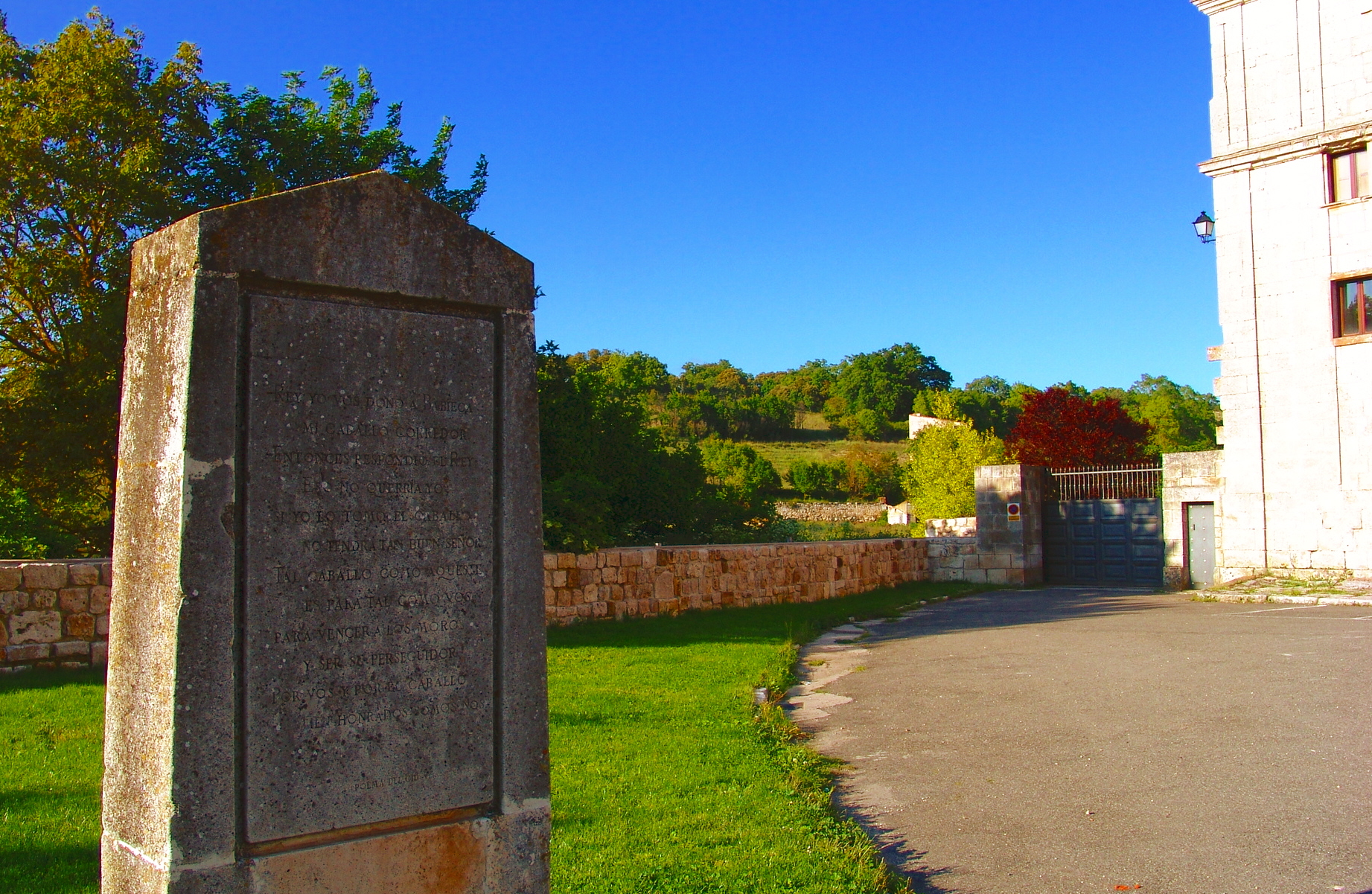 Recuerdo de Babieca, Monasterio de San Pedro de Cardeña, Castrillo del Val, Burgos, España